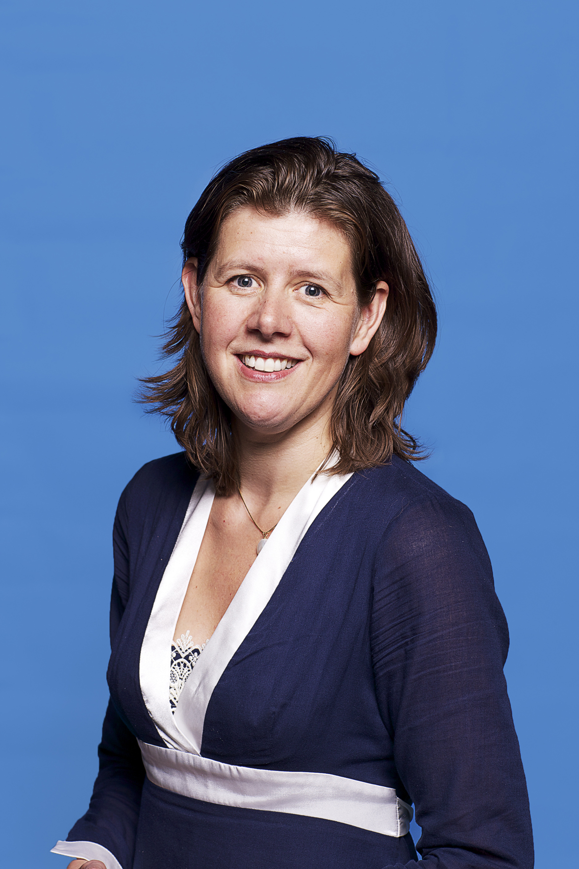 Sjoera Dikkers, Tweede Kamerlid. Foto: Lex Draijer.